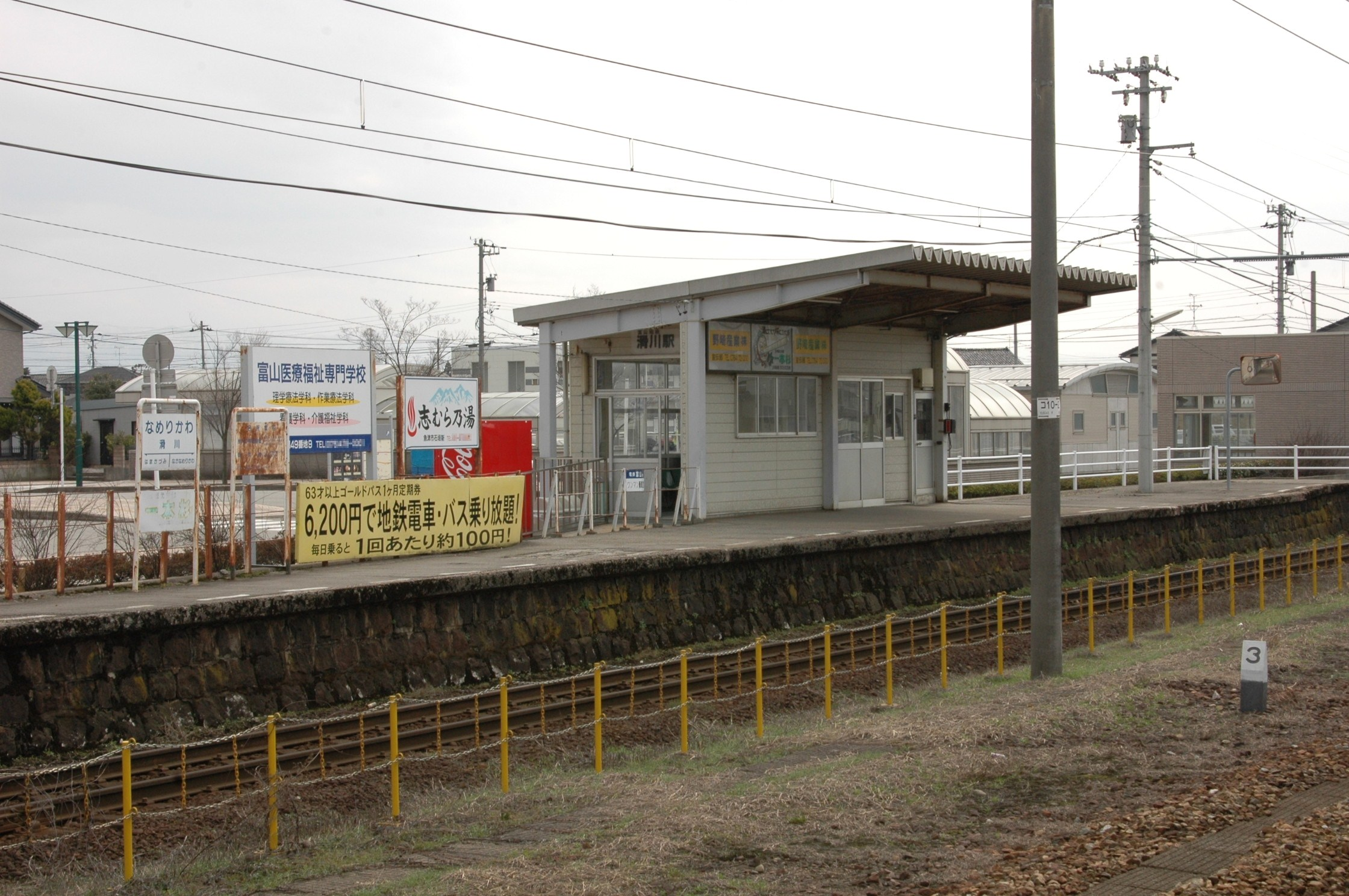 富山地方鉄道滑川駅